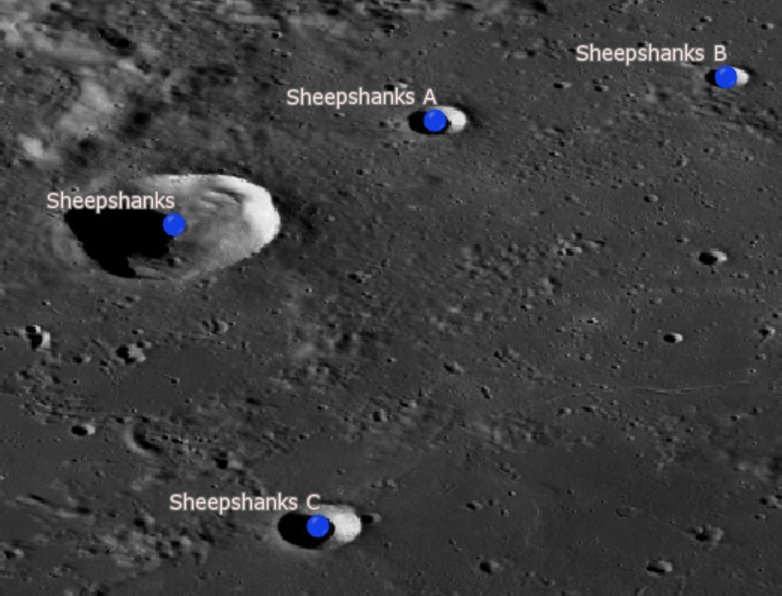 Cráter lunar Seepshanks. Cráteres satélite. (Imagen LRO)